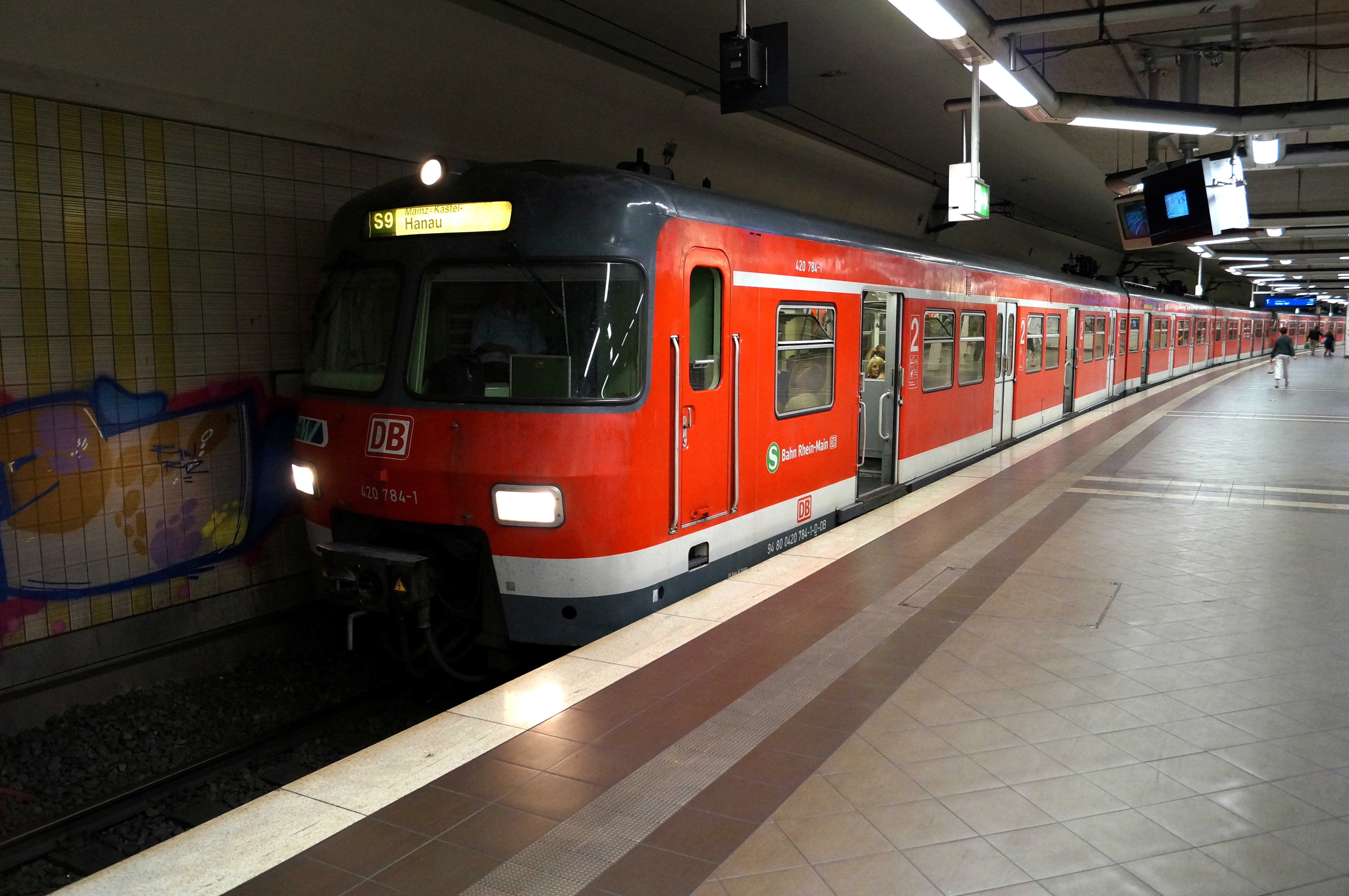 S9 der S-Bahn Rhein-Main mit Triebwagen der DB-Baureihe 420 im Bahnhof Frankfurt (Main) Mühlberg